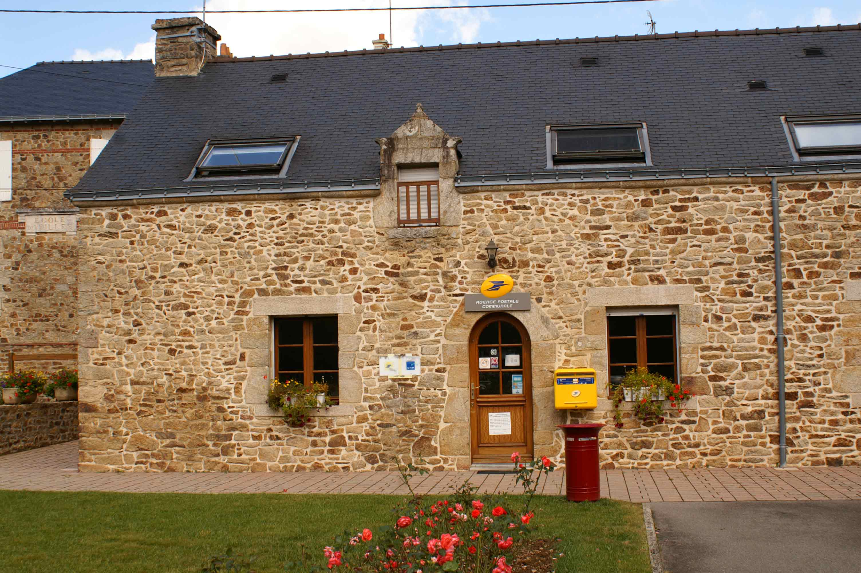 La poste de Marzan en 2009